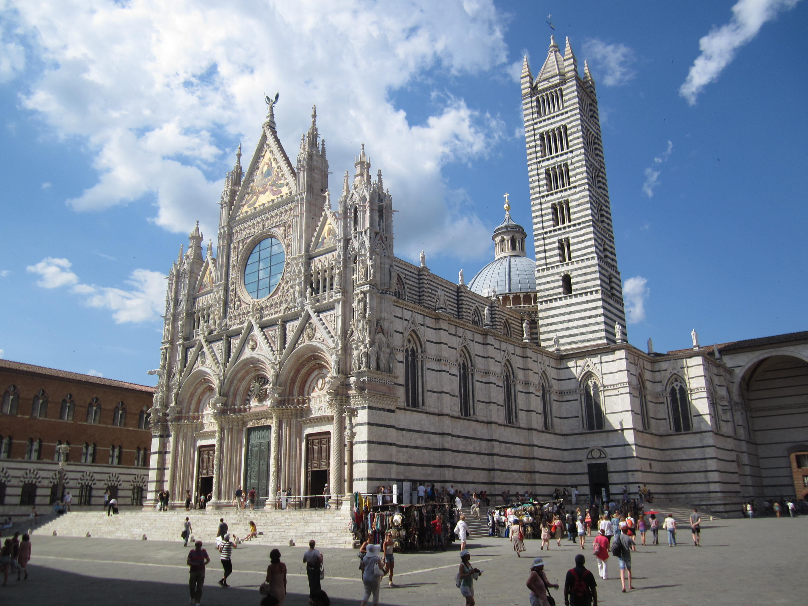 Veduta del Duomo di Siena